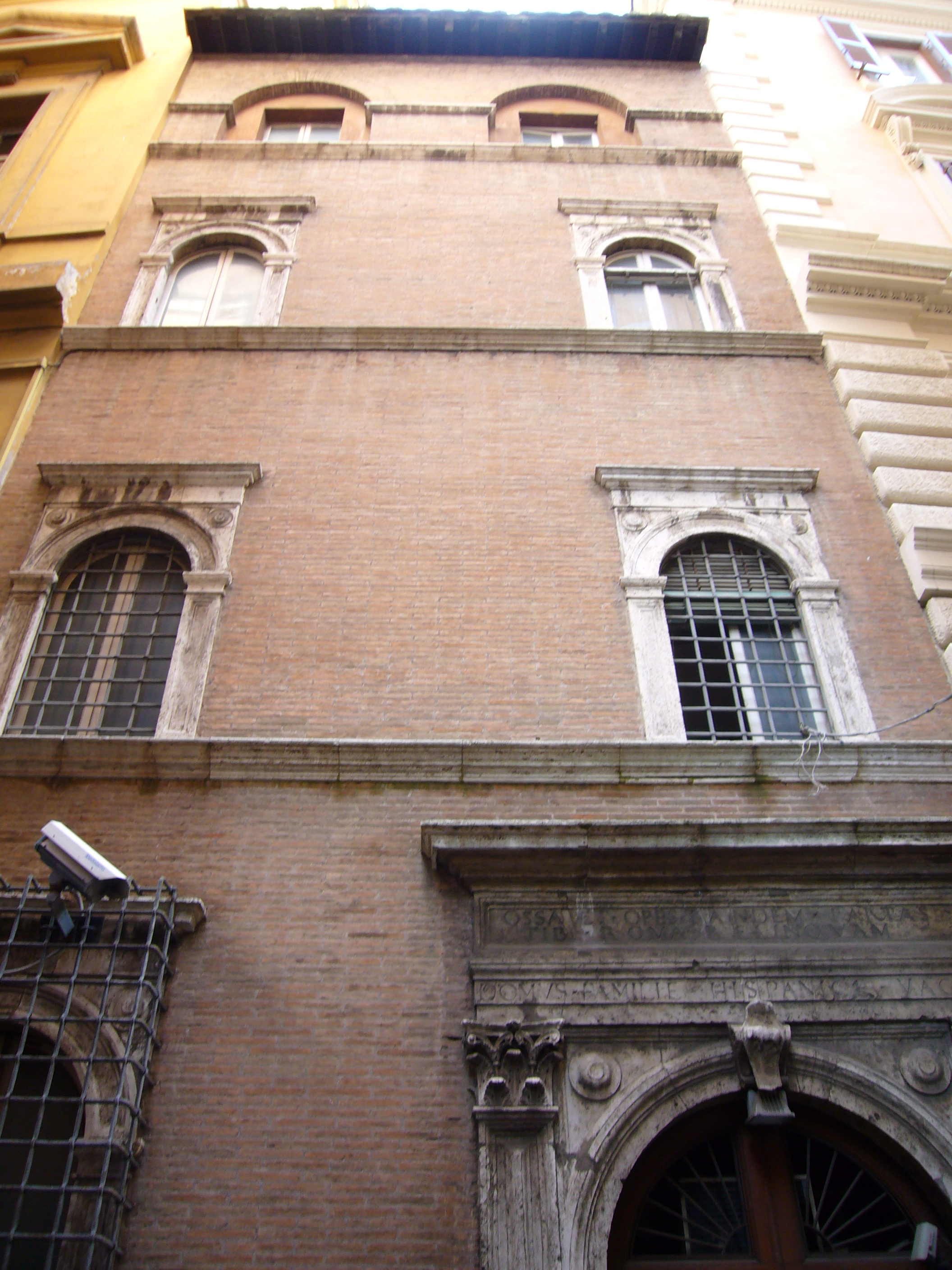 Roma, via in Lucina, casa Vacca (XV sec. ricostruzione ottocentesca). In questa casa di famiglia abitò anche lo scultore Flaminio Vacca.